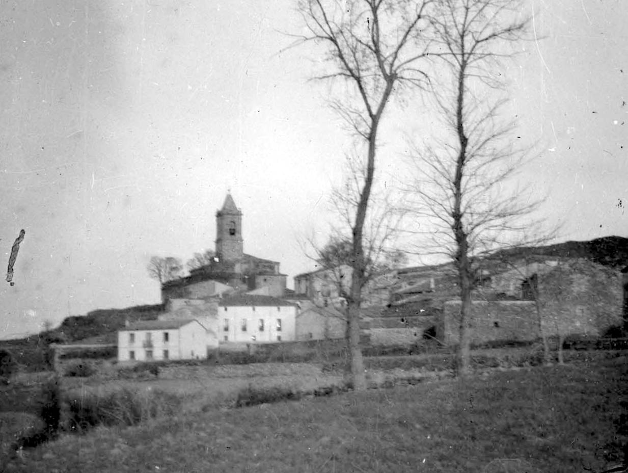 Indalecio Ojanguren mendizale eta argazkizale eibartarrak Etaion harturiko argazkia.